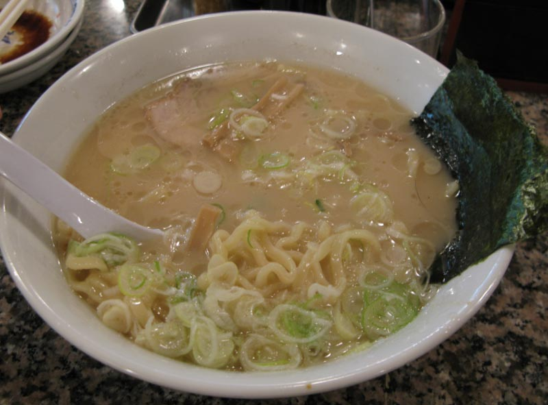 麵條很Q還不錯吃，叉燒也不錯，不過總覺得湯比較油